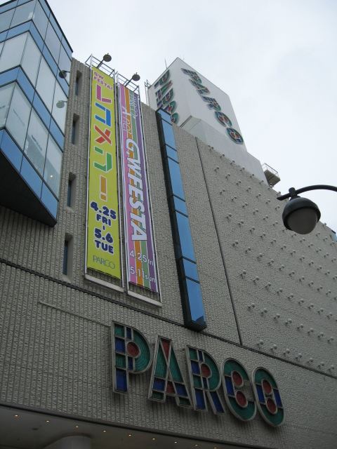 渋谷PARCO PART-1